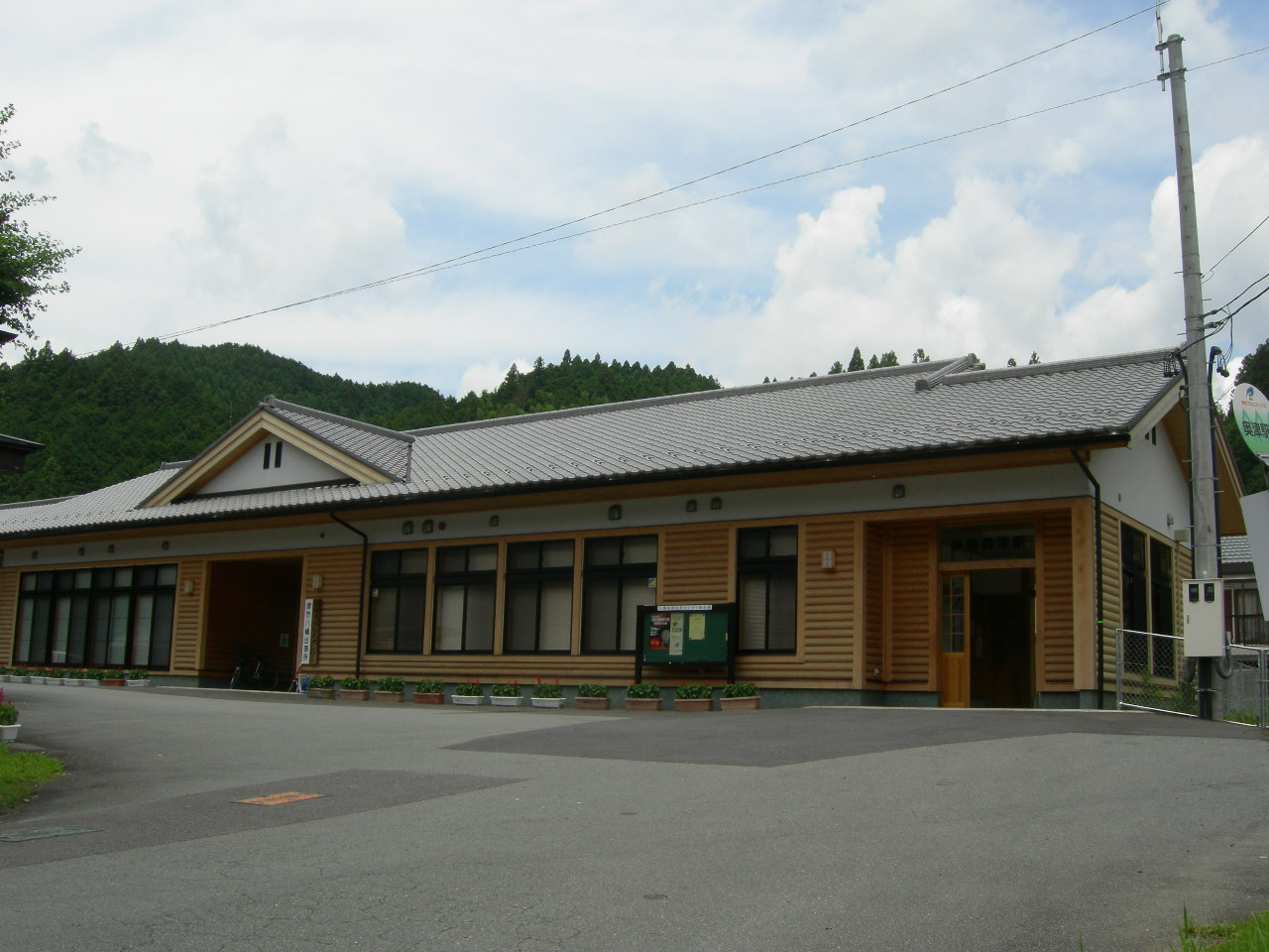 伊勢奥津駅（Ise-Okitsu station）駅舎